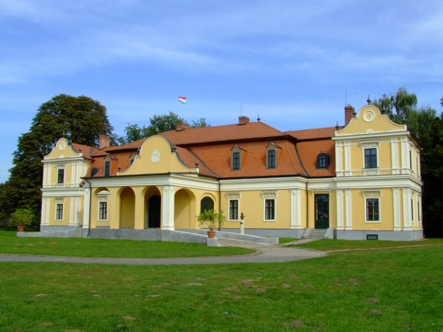 A tuzséri Lónyay-kastély.